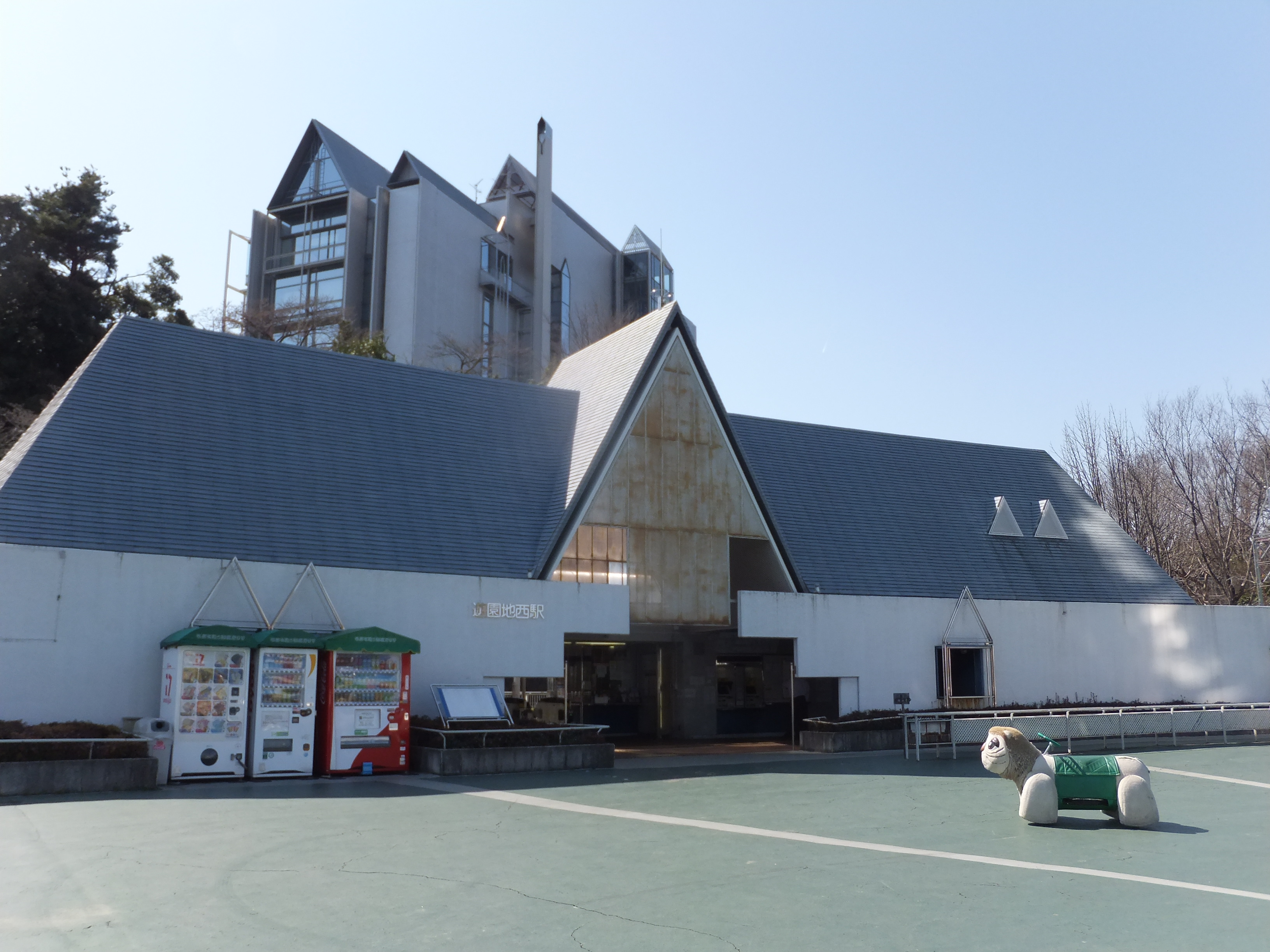 西武山口線 遊園地西駅